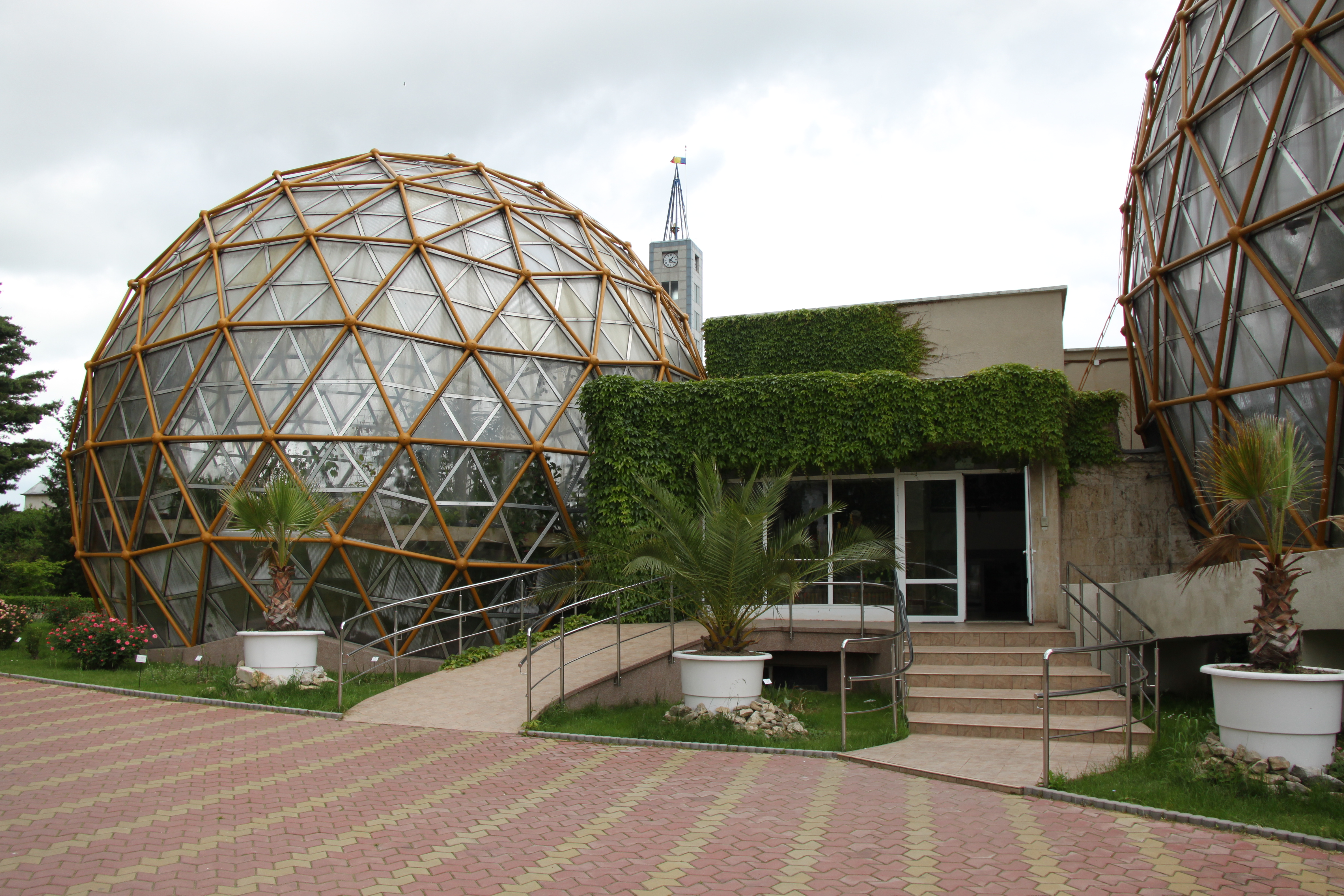 Jibou – Salaj - Mai 2010